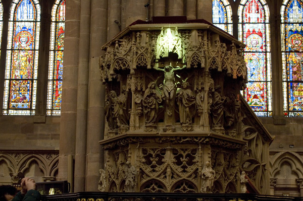 rayon vert de la cathédrale de Strasbourg sur la chaire le jour de l'équinoxe de printemps à 11h 38mn